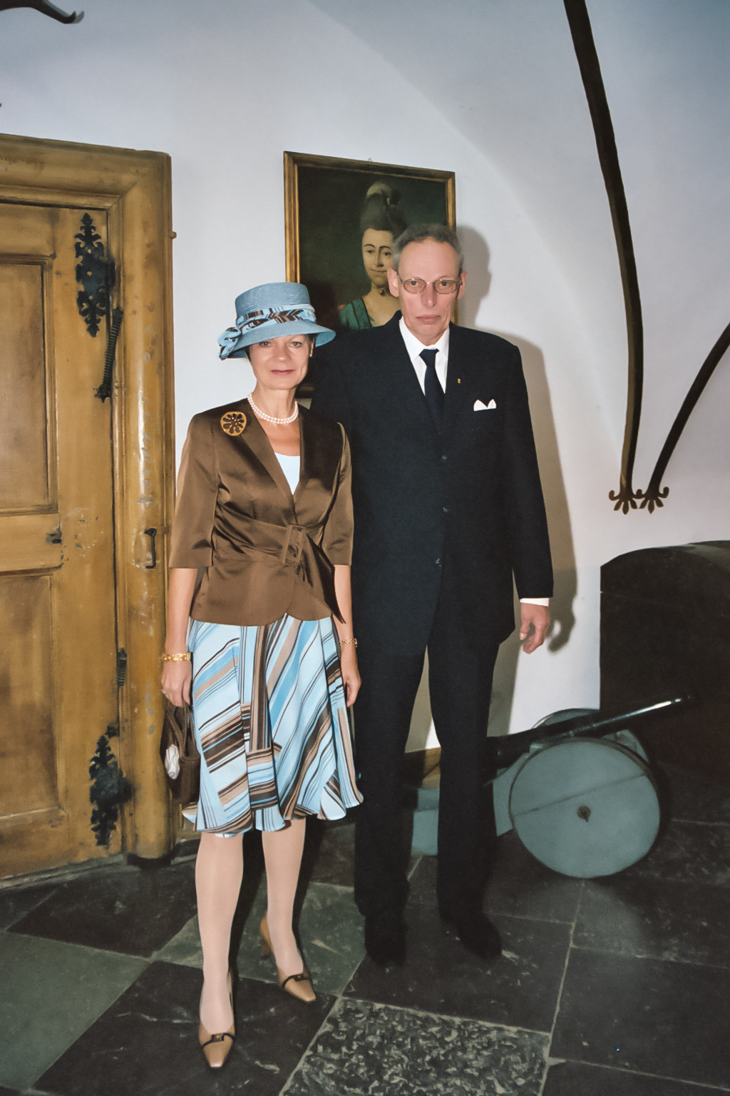 Greveparret Ingolf og Sussie af Rosenborg optaget ved en lejlighed i 2005 på slottet Glücksborg.